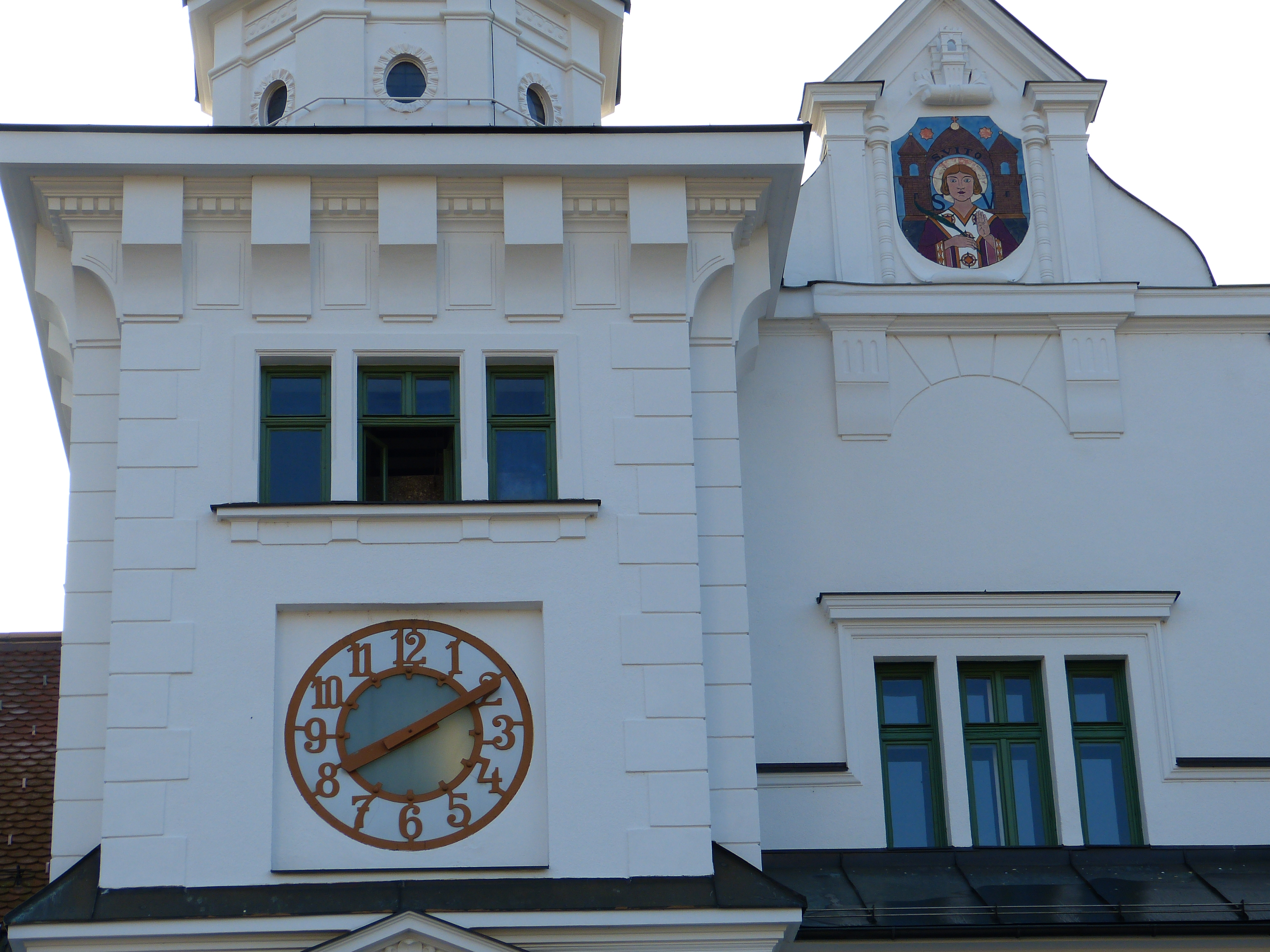 denkmalgeschützter Bahnhof St. Veit / Glan nach Renovierung 2015: Detail Nordseite